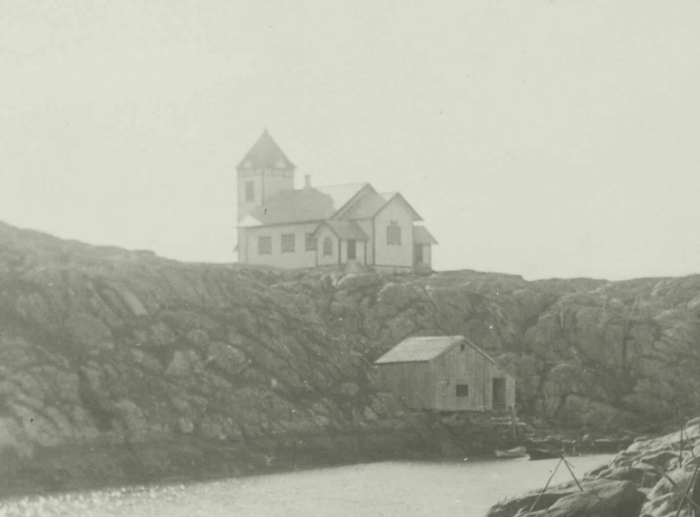 Froan kapell på Sauøya. Beskåret versjon av File:Sauøya, Froan UBT-TO-080983 01 1.jpg.